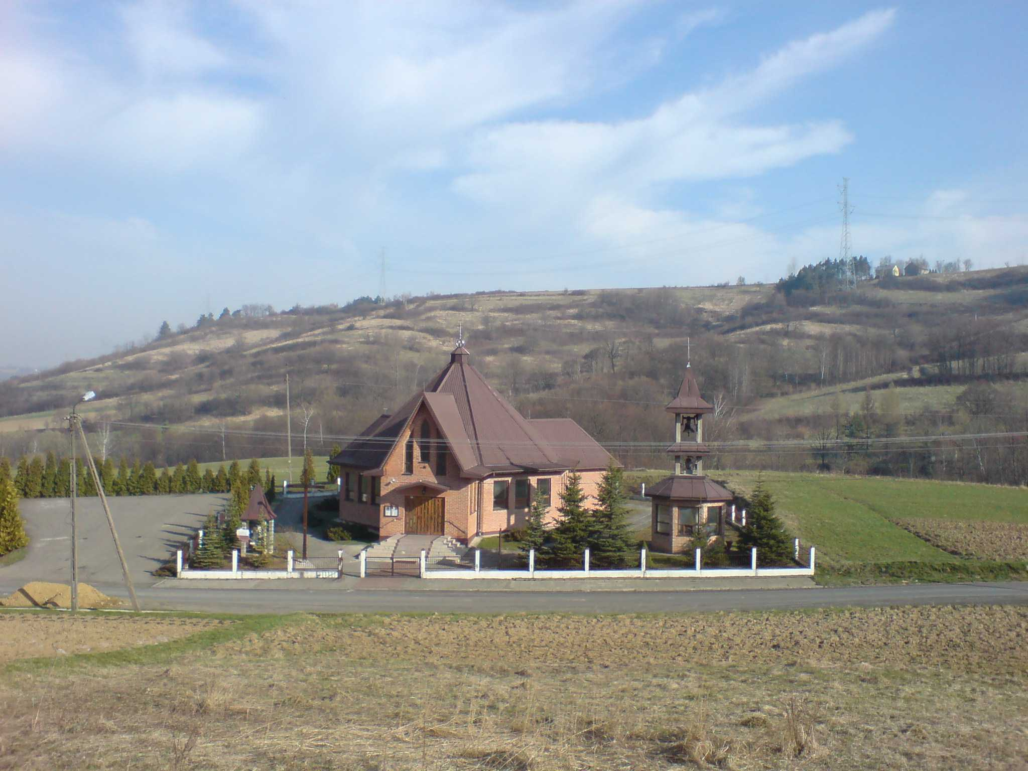 Kaplica w Bukowej